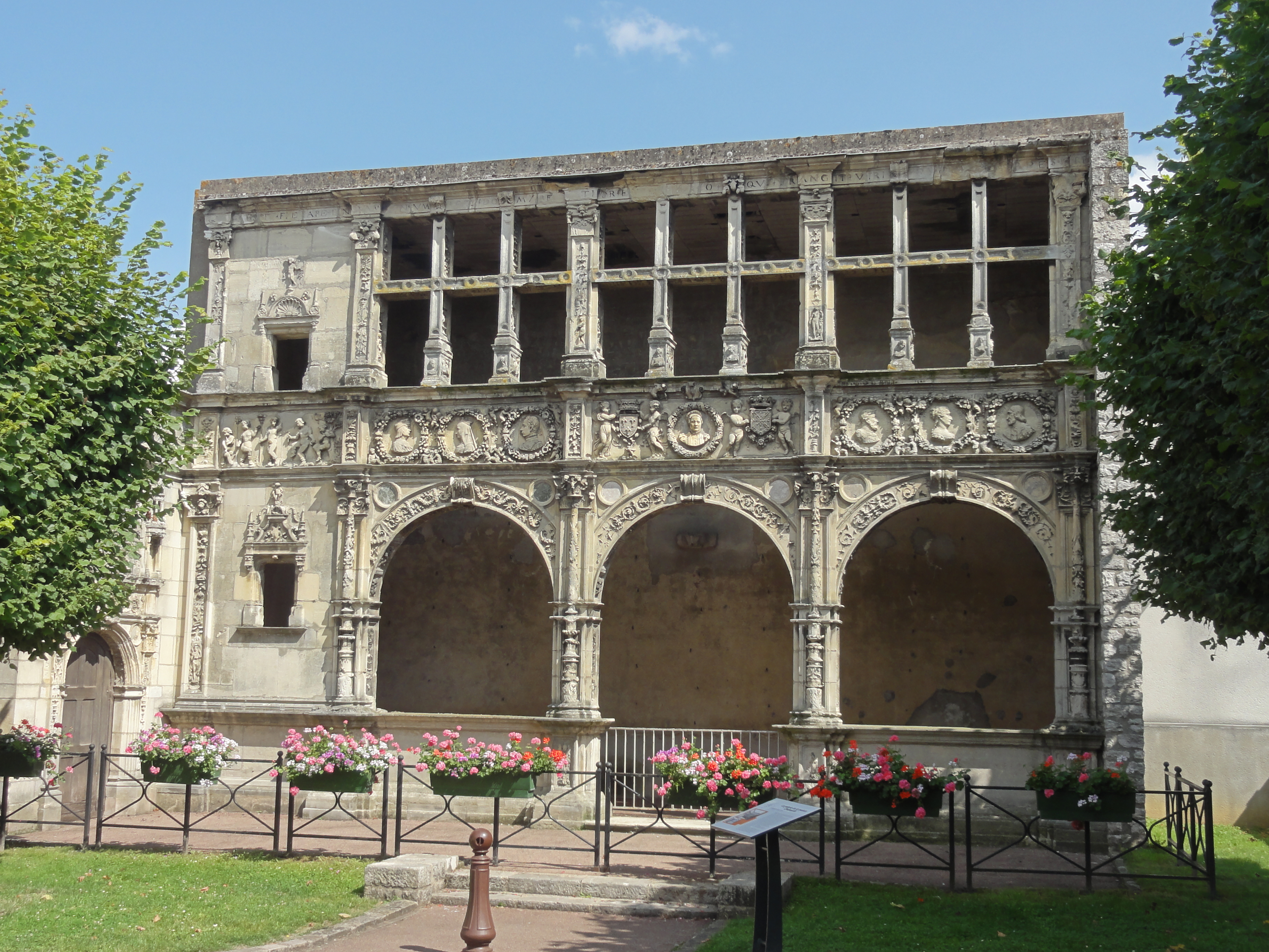 Hôtel de Chabouillé, dite maison de François Ier.